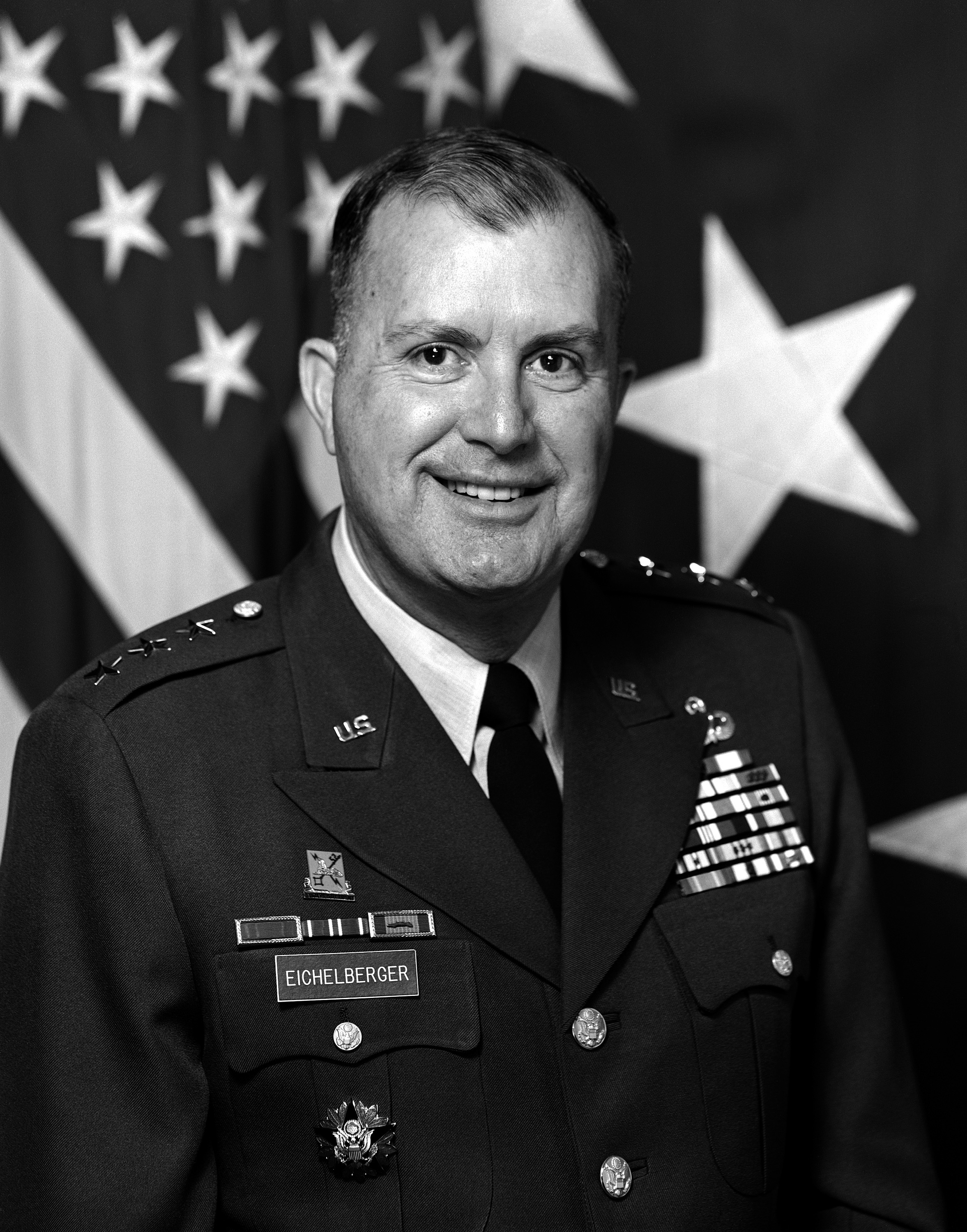 Lieutenant General Charles B. Eichelberger